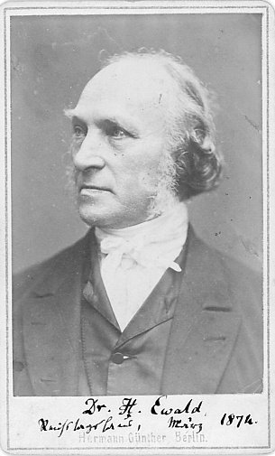 Heinrich Ewald im Alter von 70 Jahren, März 1874. Foto von Hermann Günther.